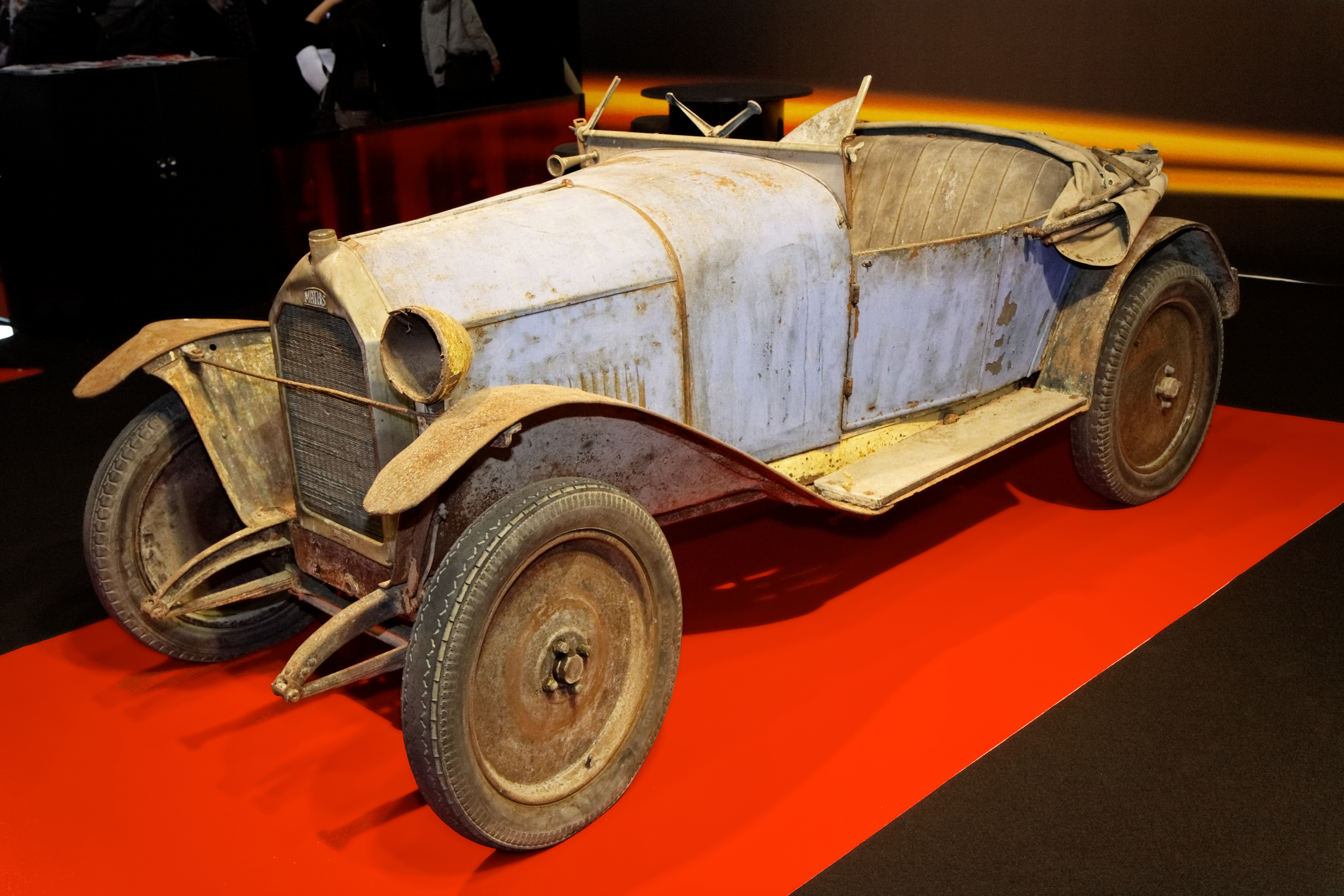 Cyclecar Mathis type P